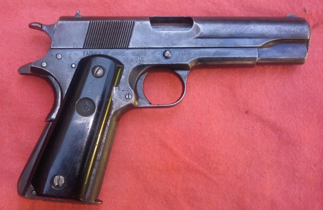 Pistola Obregón